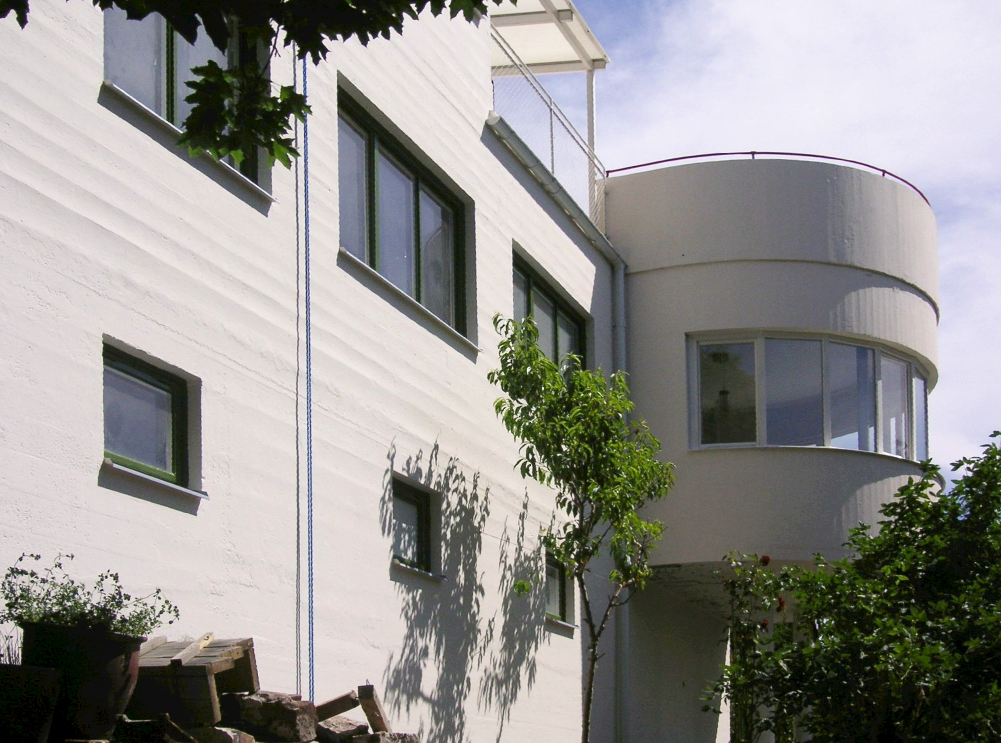 "Villa Markelius" i Stockholm (Nockeby). Arkitelt Sven Markelius egen villa från 1930